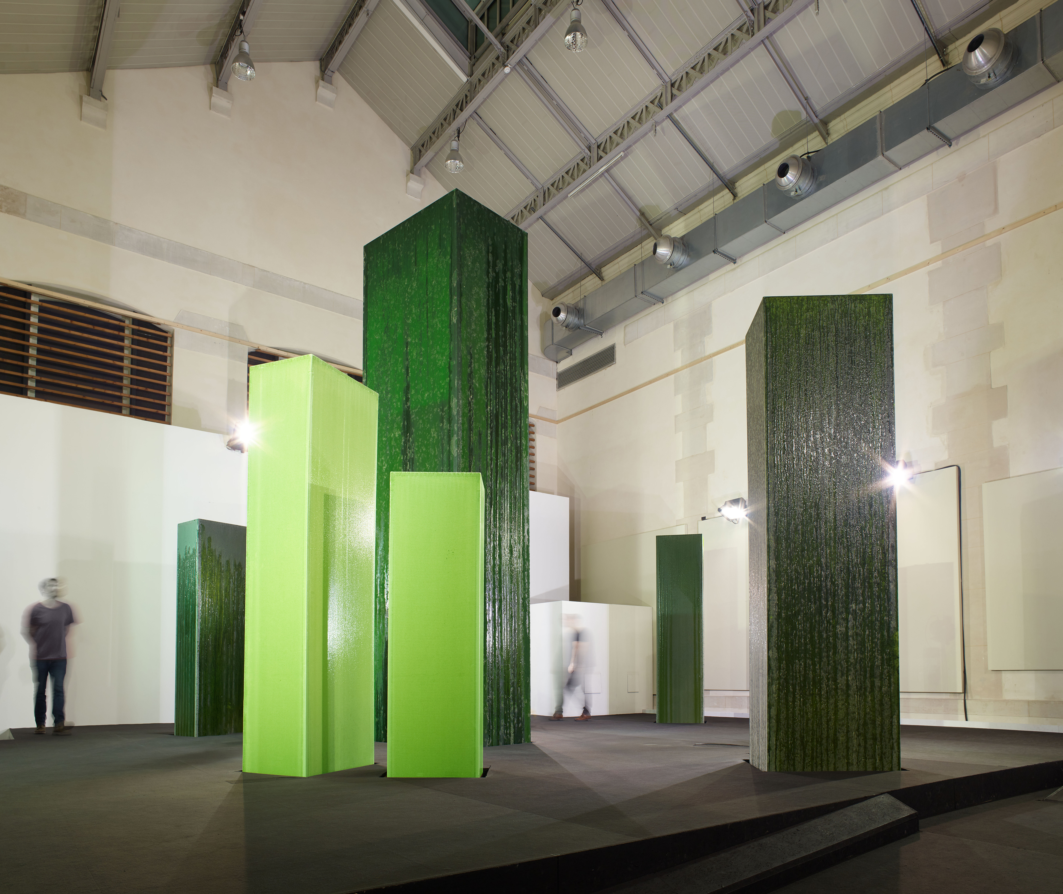 2017 Phytoplanctons, lumière, eau et Techniques mixtes. Dimensions: 12 x 12 x 6 m Exposition "Les faits du hasard" // CENTQUATRE - Paris // co-curateurs: Gilles Alvarez et José-Manuel Gonçalvès. Production : Maribel Martin Girel (collaboratrice du laboratoire UPM), Vincent Combaut (conception volume), Faustine Haurillon (réalisation textile), Antoine Pintout (Métallerie et suivi de production), Juan Cruz Ibanez (photographie), Baptiste Laigle (vidéo) et Adeline Lacombe (chargée de production). Producteurs associés : Le laboratoire de Botanique et Biotechnologie UPM (Université Polytechnique de Madrid), Arcadi Île-de-France, le CENTQUATRE-PARIS, la DRAC Bourgogne-Franche-Comté (aide à l’acquisition de matériel), la Cité internationale des arts de Paris et La Briche.